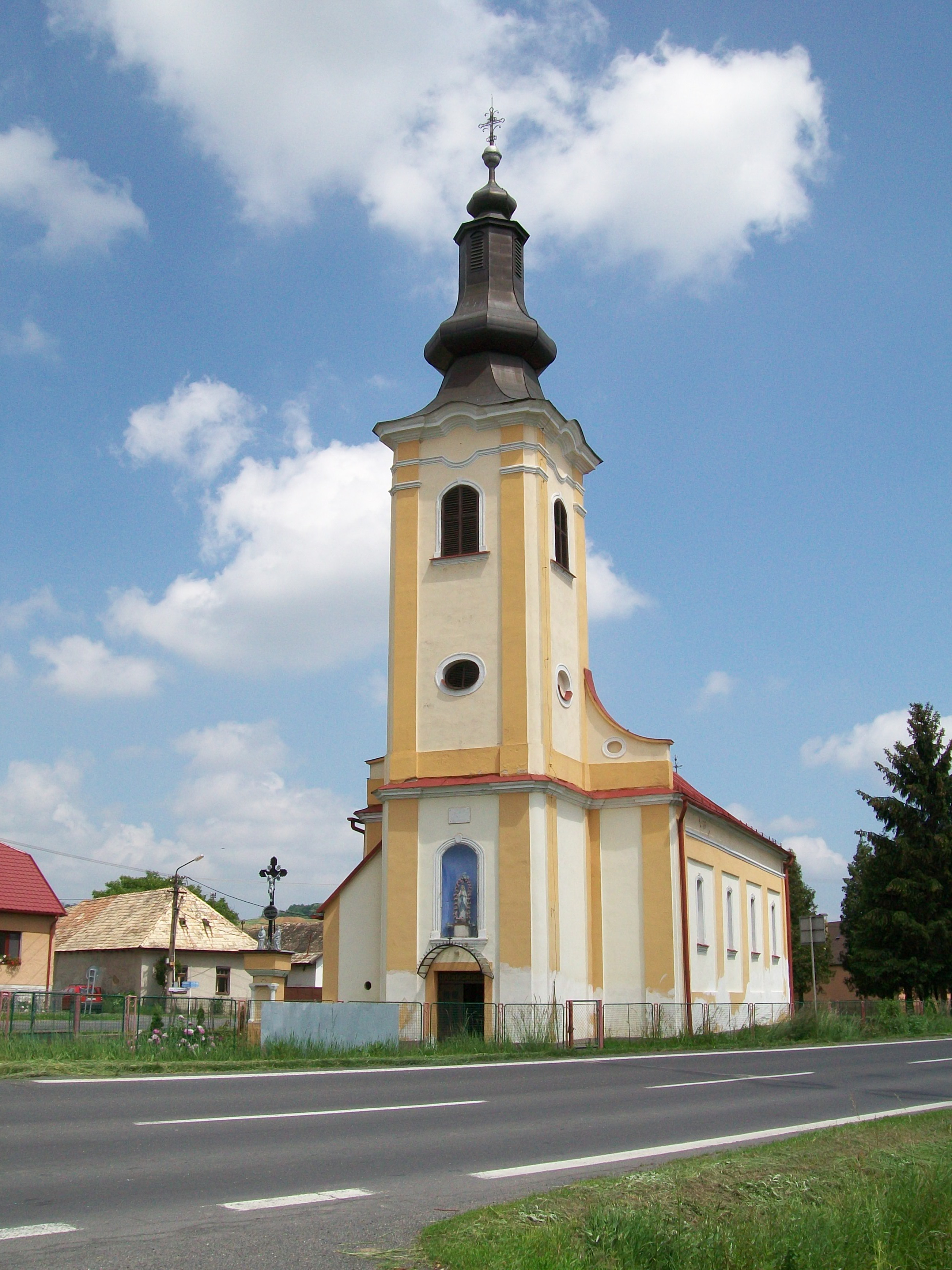 Rímsko-katolícky kostol Všetkých svätých v Pincinej, patrocínium kostola Všetkých svätých v Pincinej je doložené v roku 1542. Súčasný kostol je z roku 1900 a bol postavený na starých základoch.